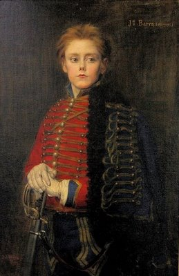 Joseph Bara (1780-1793)